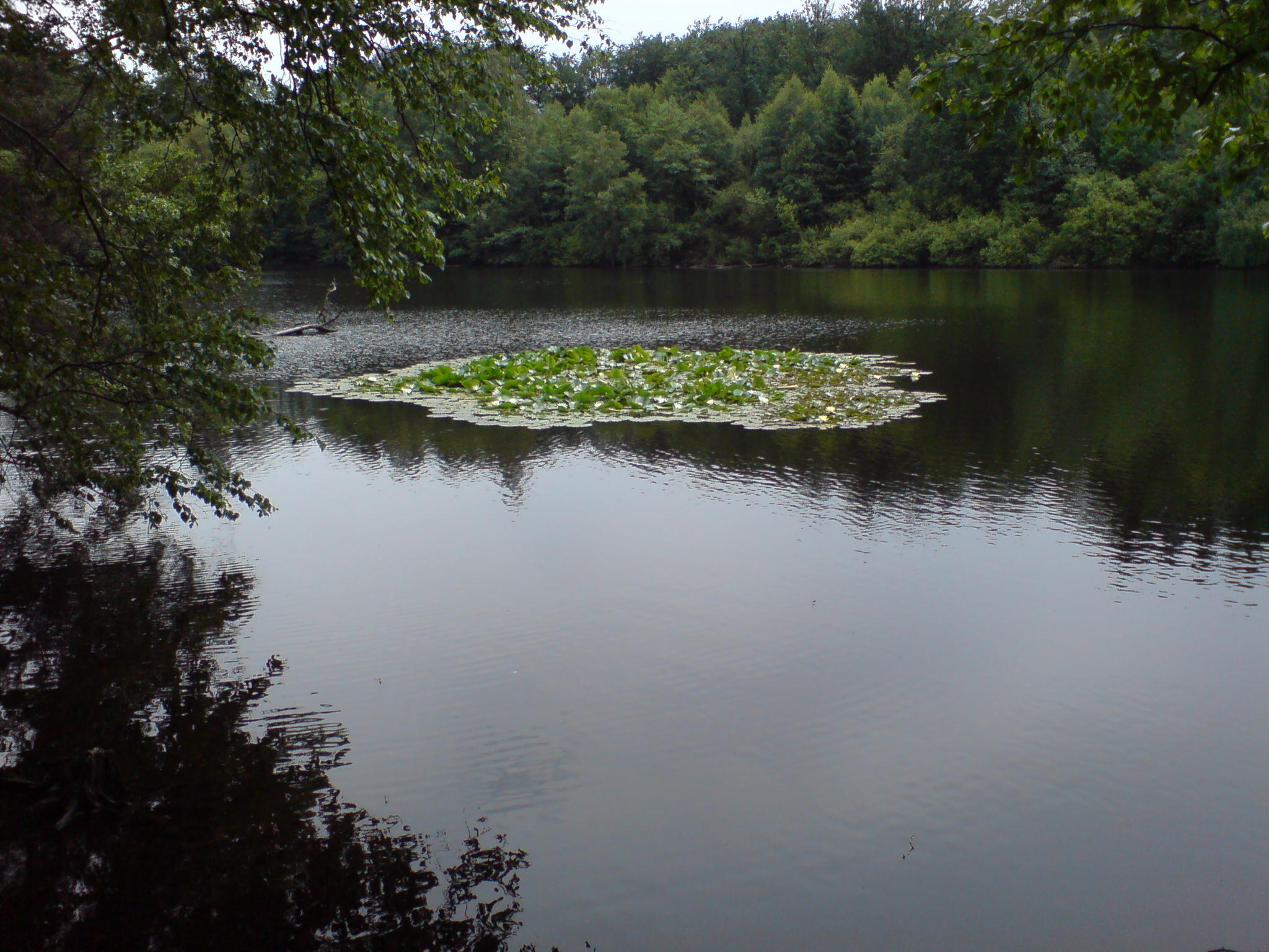 Spickelweiher im Königsbruch bei Homburg Saar (Ortsteil Jägersburg)